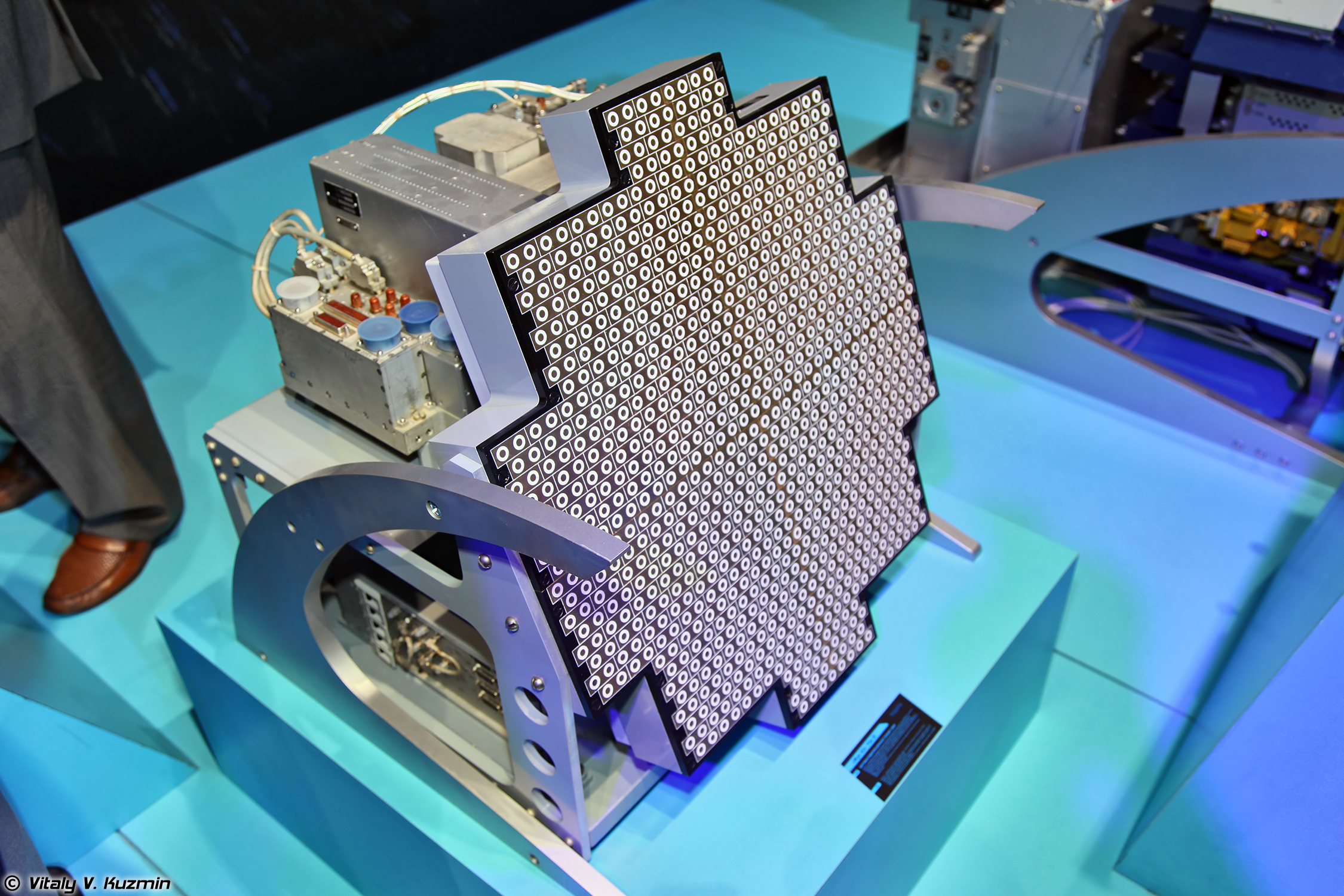 Модифицированный вариант БРЛС Жук-АЭ/FGA-35 с АФАР (Zhuk-AE/FGA-35 modified radar with AESA)